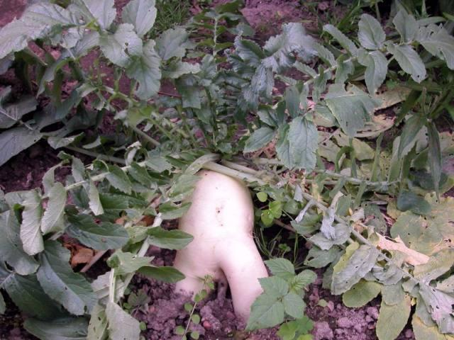 Rettich der Sorte "Bayrische Bier"